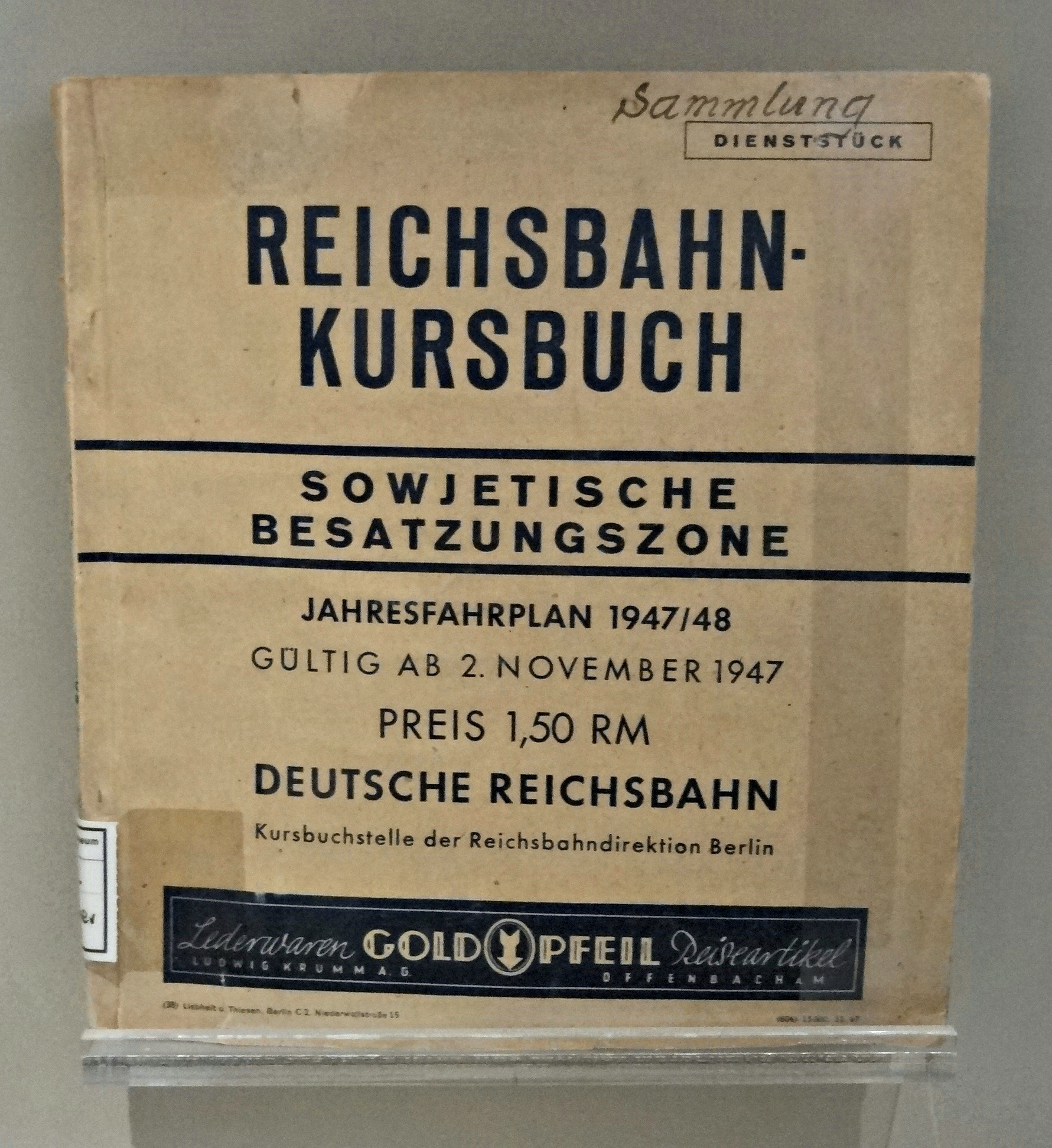 Train timetables in Germany 1947